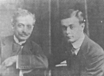 Ramón J. Cárcano (izquierda) (1860-1946), gobernador de la provincia de Córdoba, junto a su hijo Miguel Ángel.